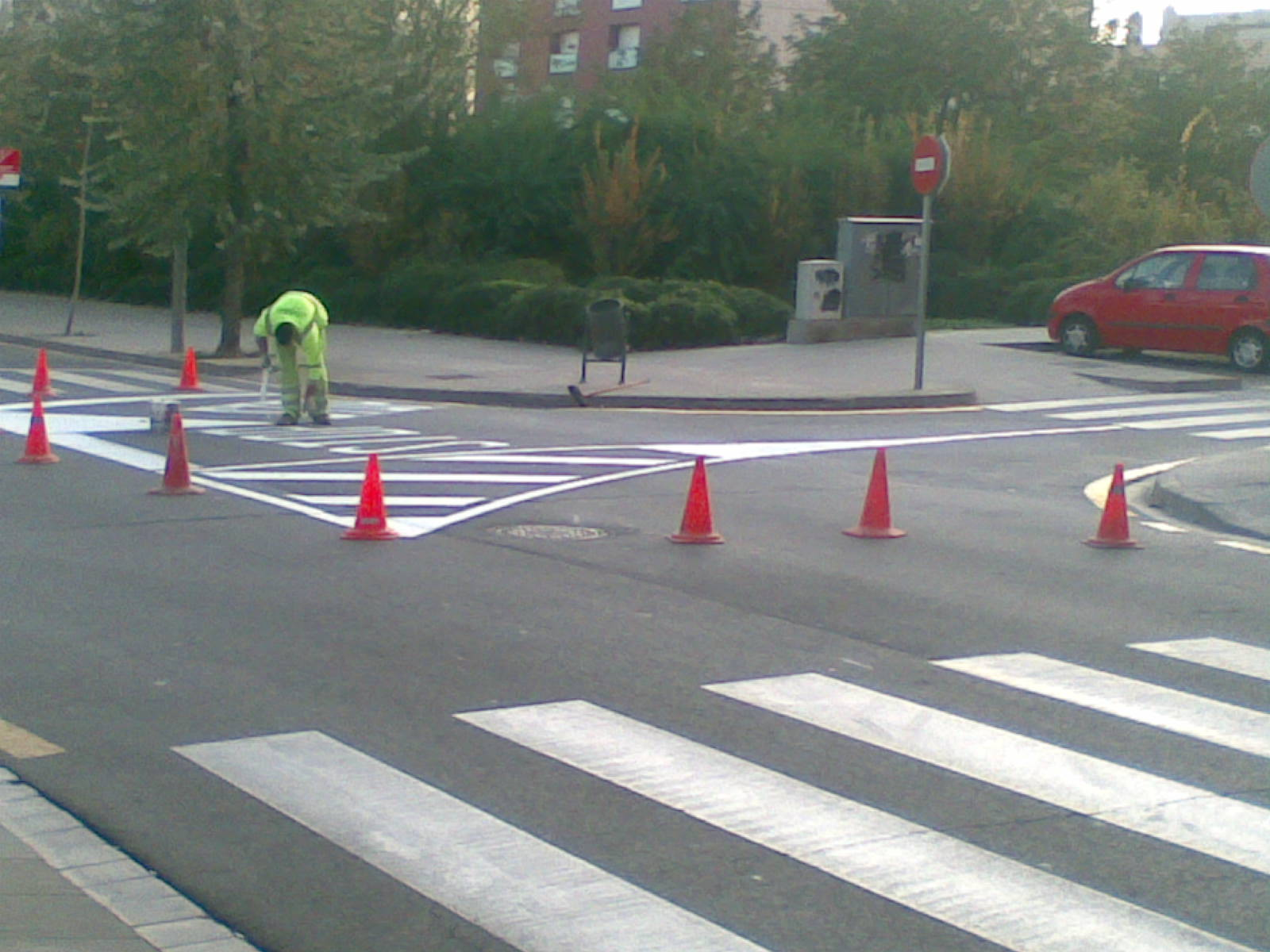 Obres al carrer Alemanya de Castellar del Vallès